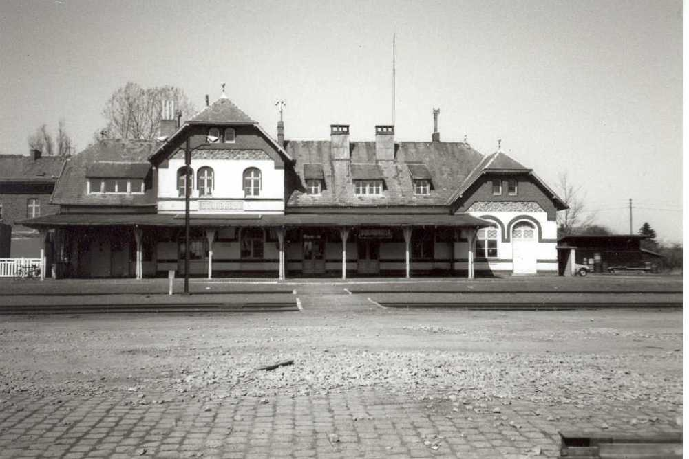 Der Bahnhof Sourbrodt an der Vennbahn